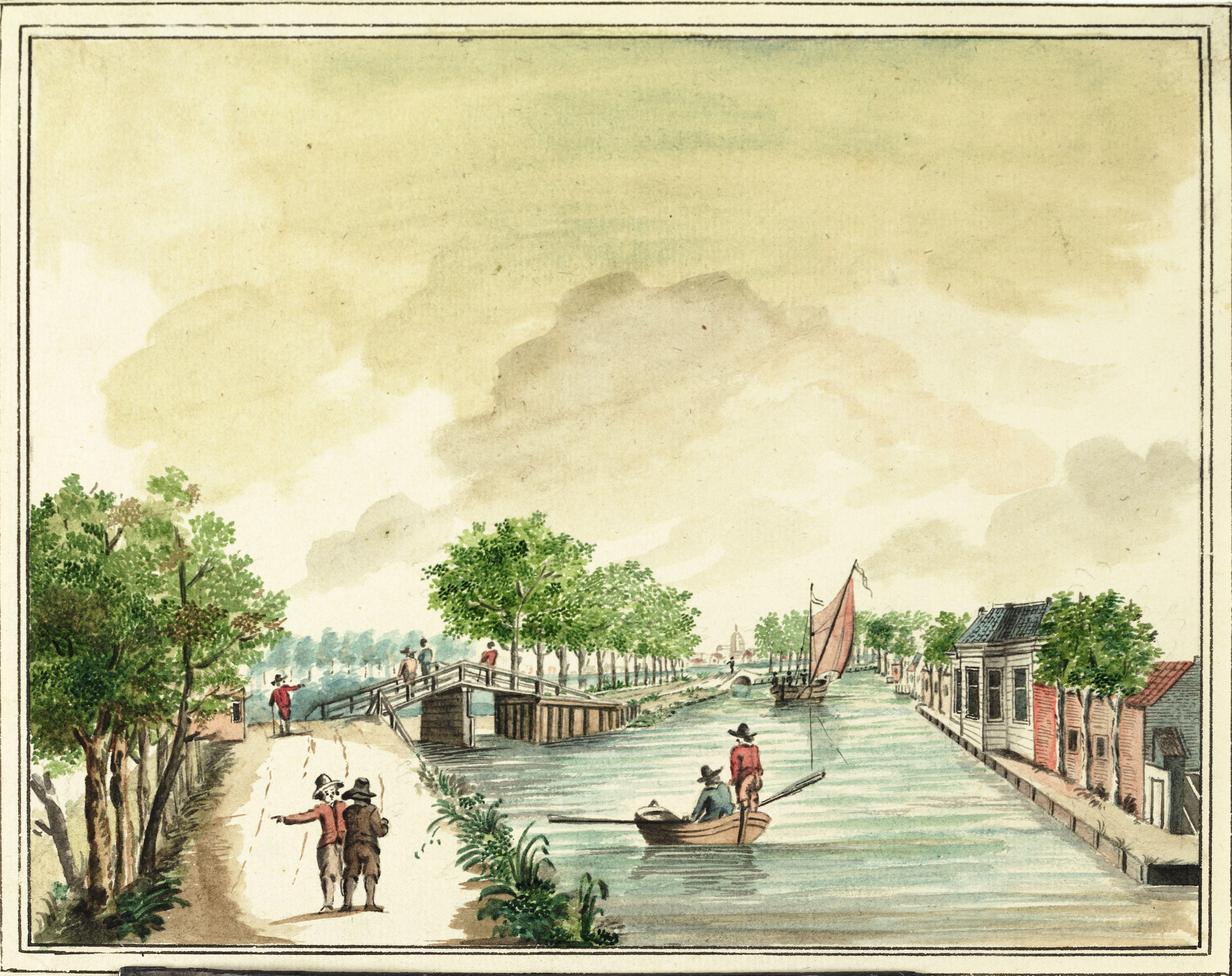 De Wouterenbrug over de Trekvliet in Leiden getekend door Jacob Timmermans. 1788